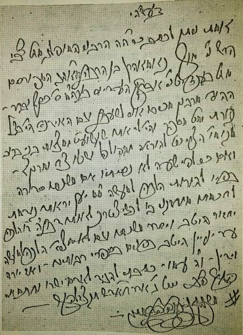 כתב סמיכה לדיינות מאת החתם סופר לר' צבי הירש גויטיין